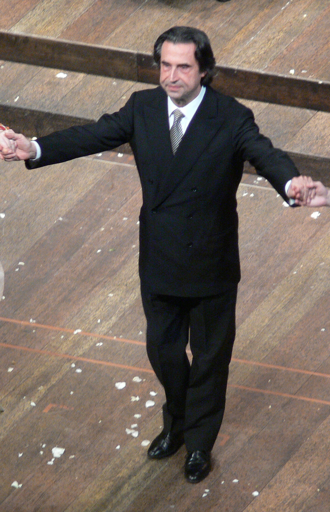 Riccardo Muti nach einer Opernaufführung der Salzburger Pfingstfestspiele 2008